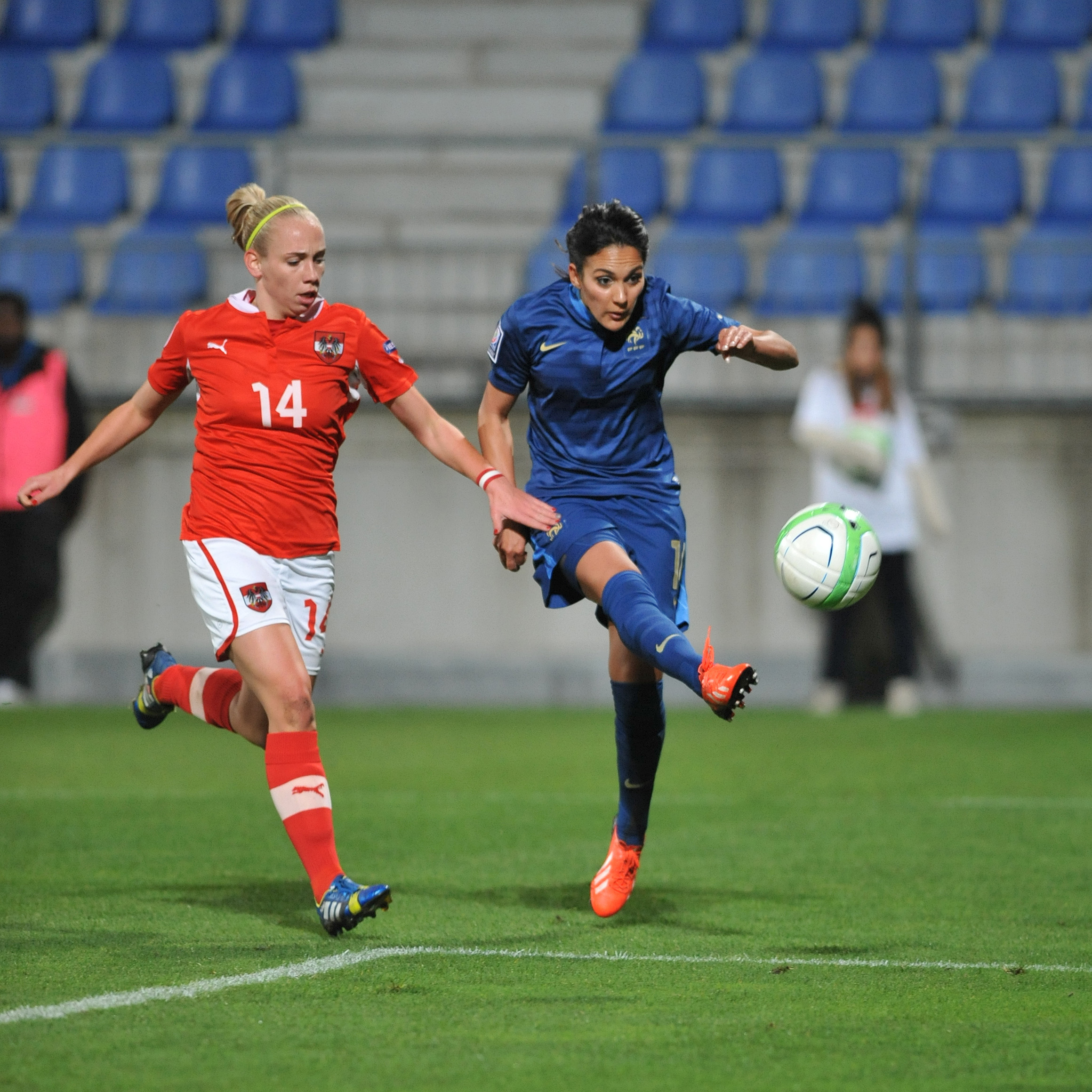 FIFA Women's World Cup 2015 Qualiying Round Österreich - Frankreich am 31. Oktober 2013 in Ritzing: Louisa Necib